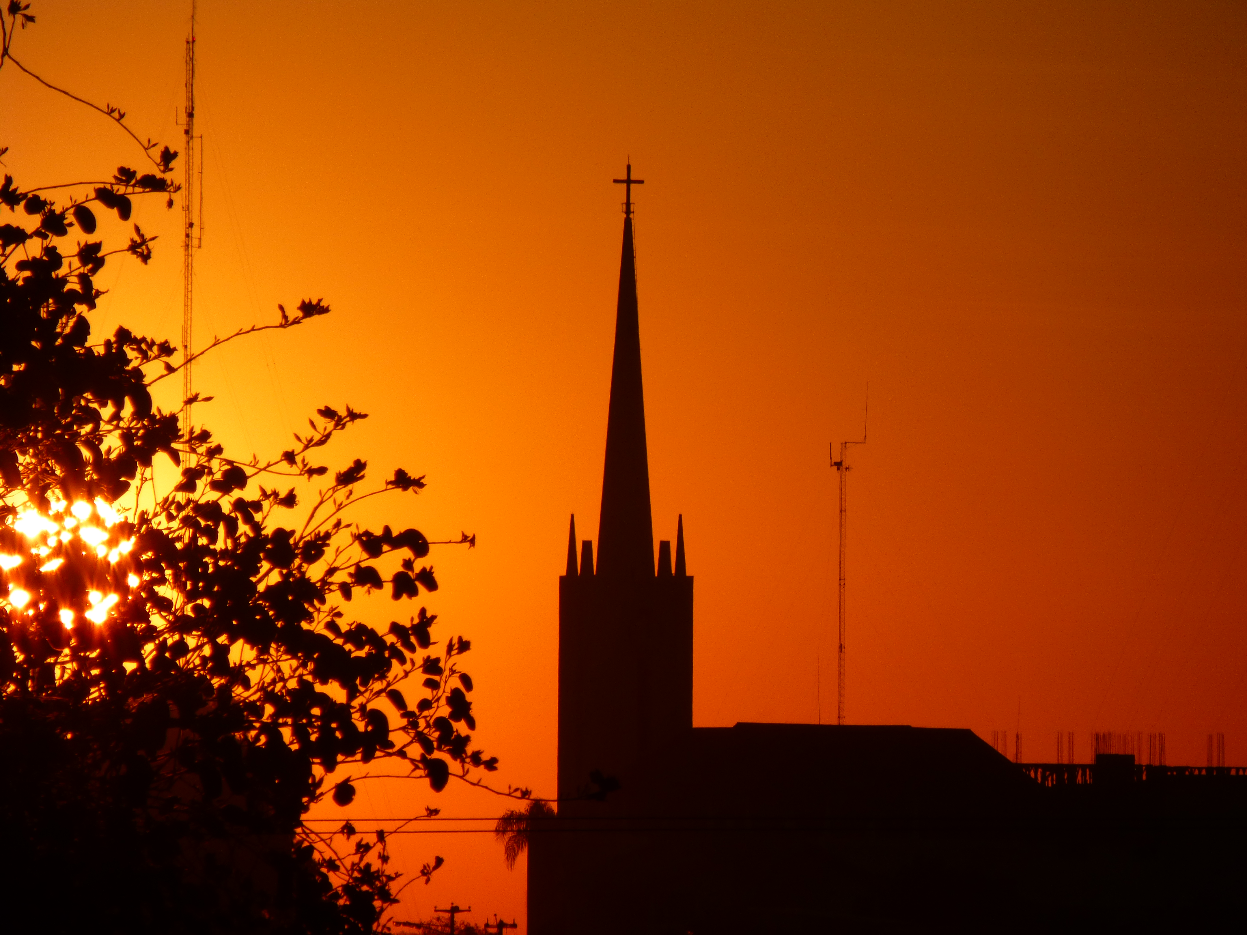 Catedral San Antonio de Padua